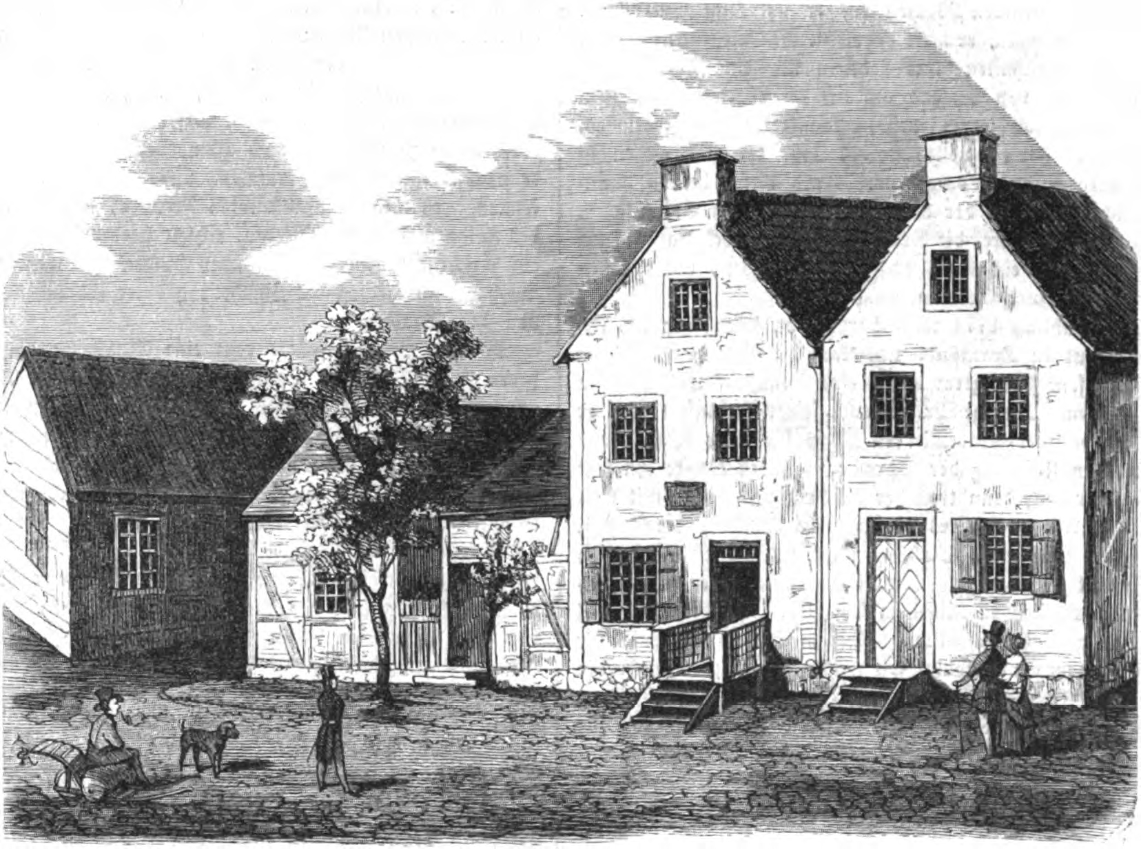 Geburtshaus des Schriftstellers Johann Gottfried Herder.